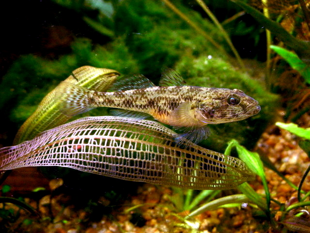 Glossobius giuris, India, kaveri river, Karnataka.